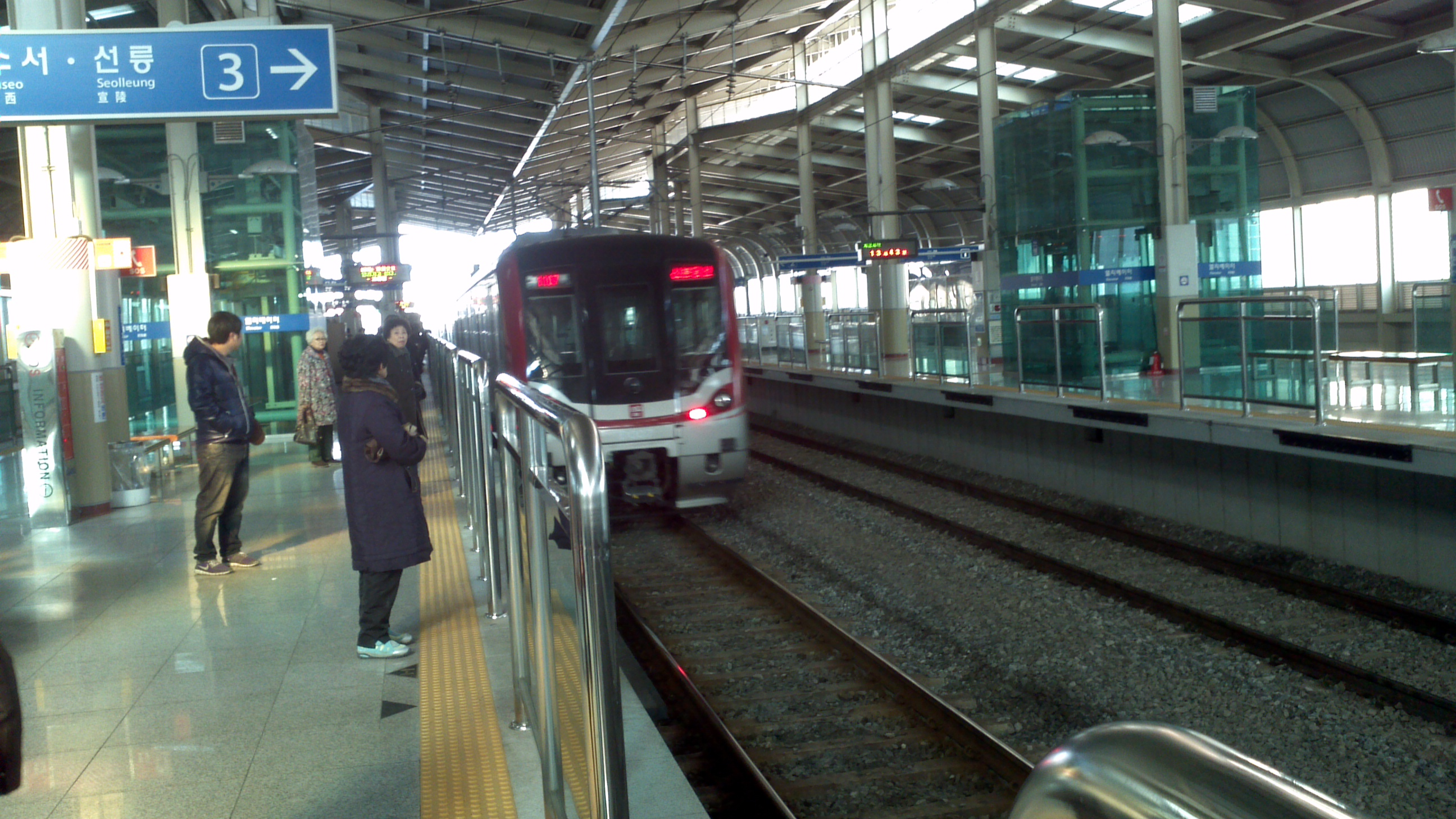 죽전역을 통과중인 신분당선